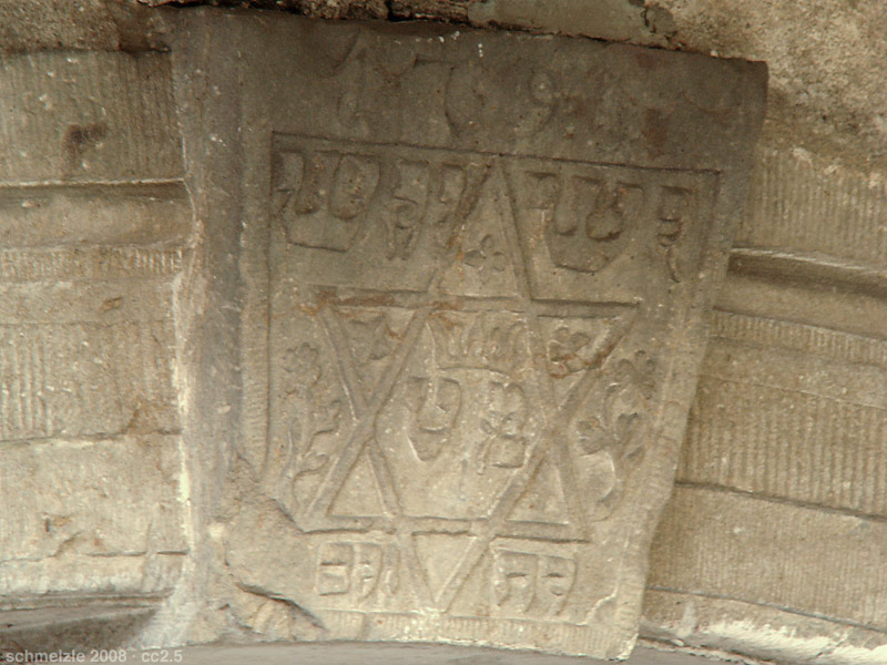 Inschriftenstein datiert 1796 am Portal der ehem. Synagoge in Heinsheim